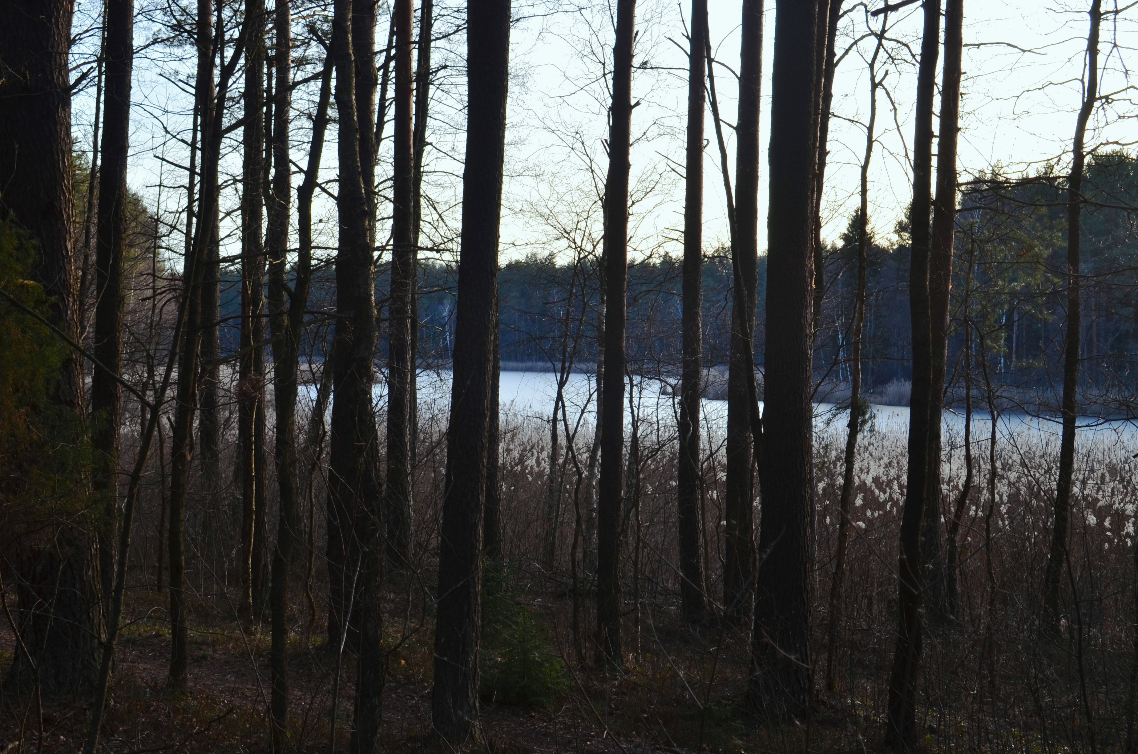 Juodžio ežeras, Antakalnio sen., Vilnius